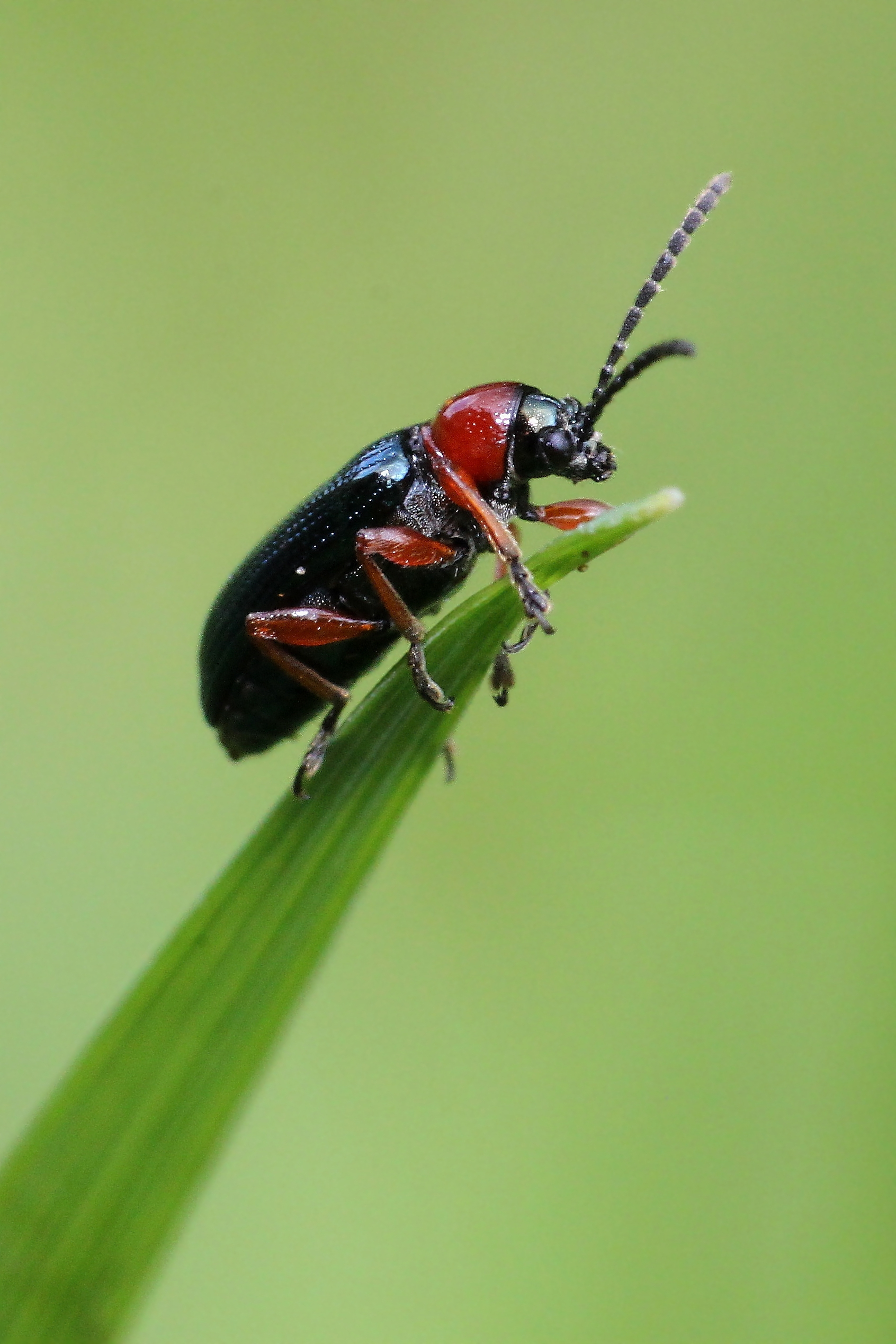 Skrzypionka zbożowa Lema melanopus - owad z rodziny stonkowatych